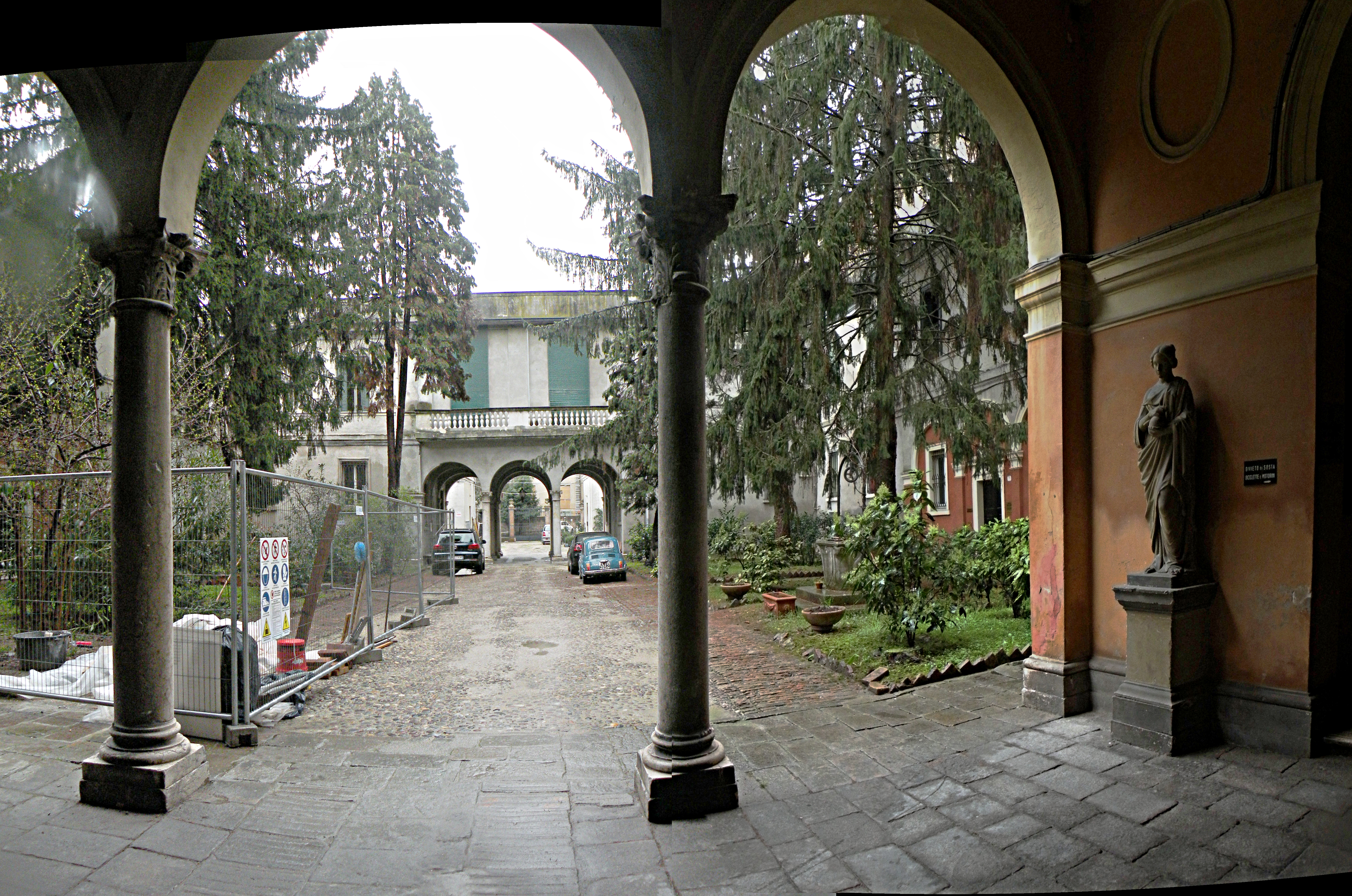 Феррара. Двор дома на улице Борго Леоне - In